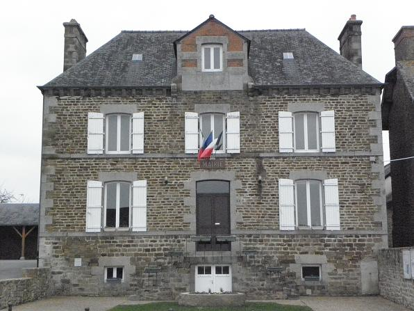 Mairie de Sougéal (35).